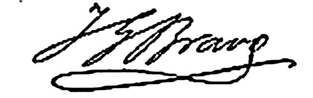 Juan Garcia Bravo firma autografa sulla bottiglia e scatola del Capilar Americano a garanzia della sua autenticità.